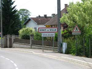 picture the Gray-la-ville